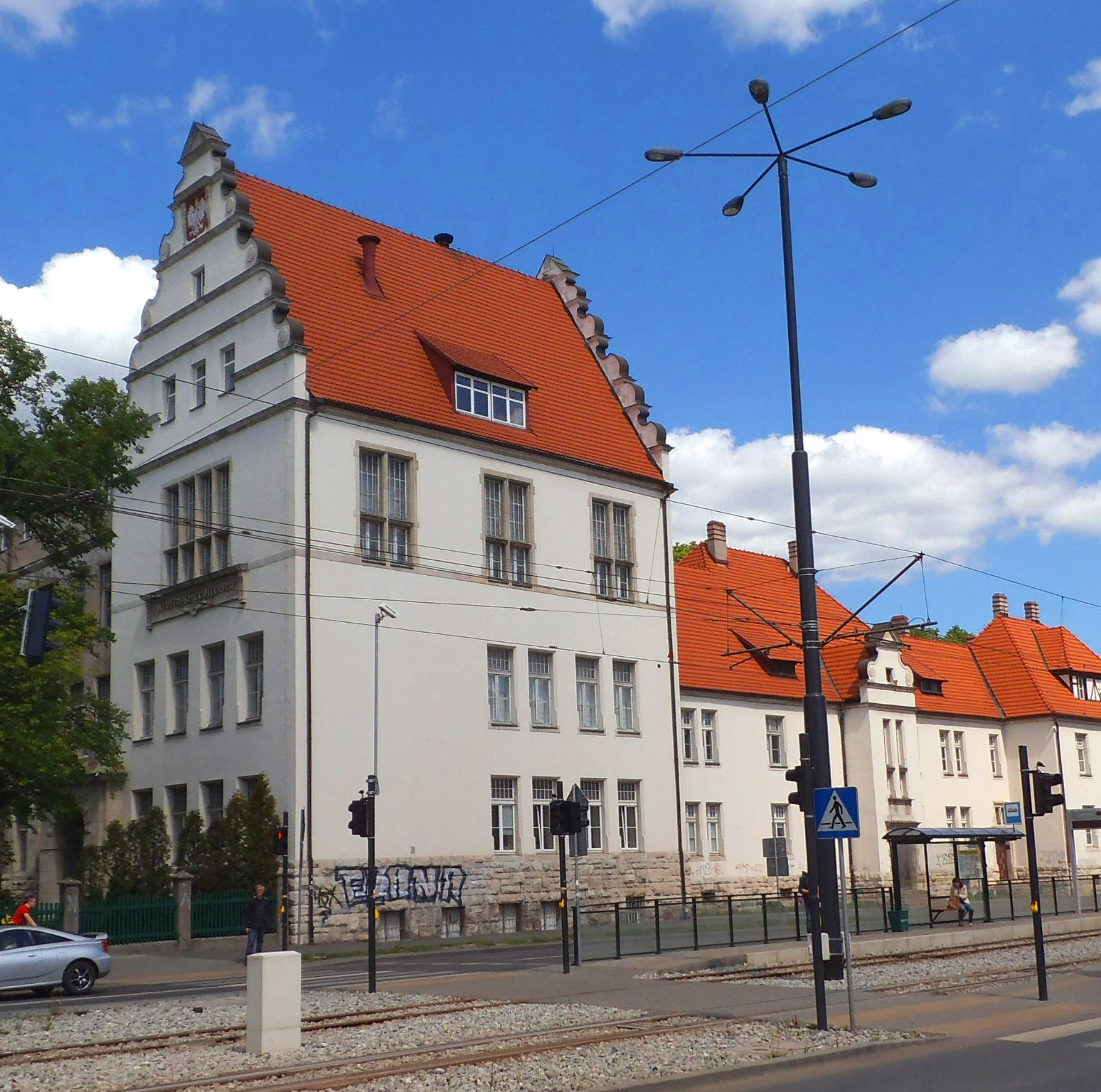 Wydział Sztuk Pięknych UMK w Toruniu2